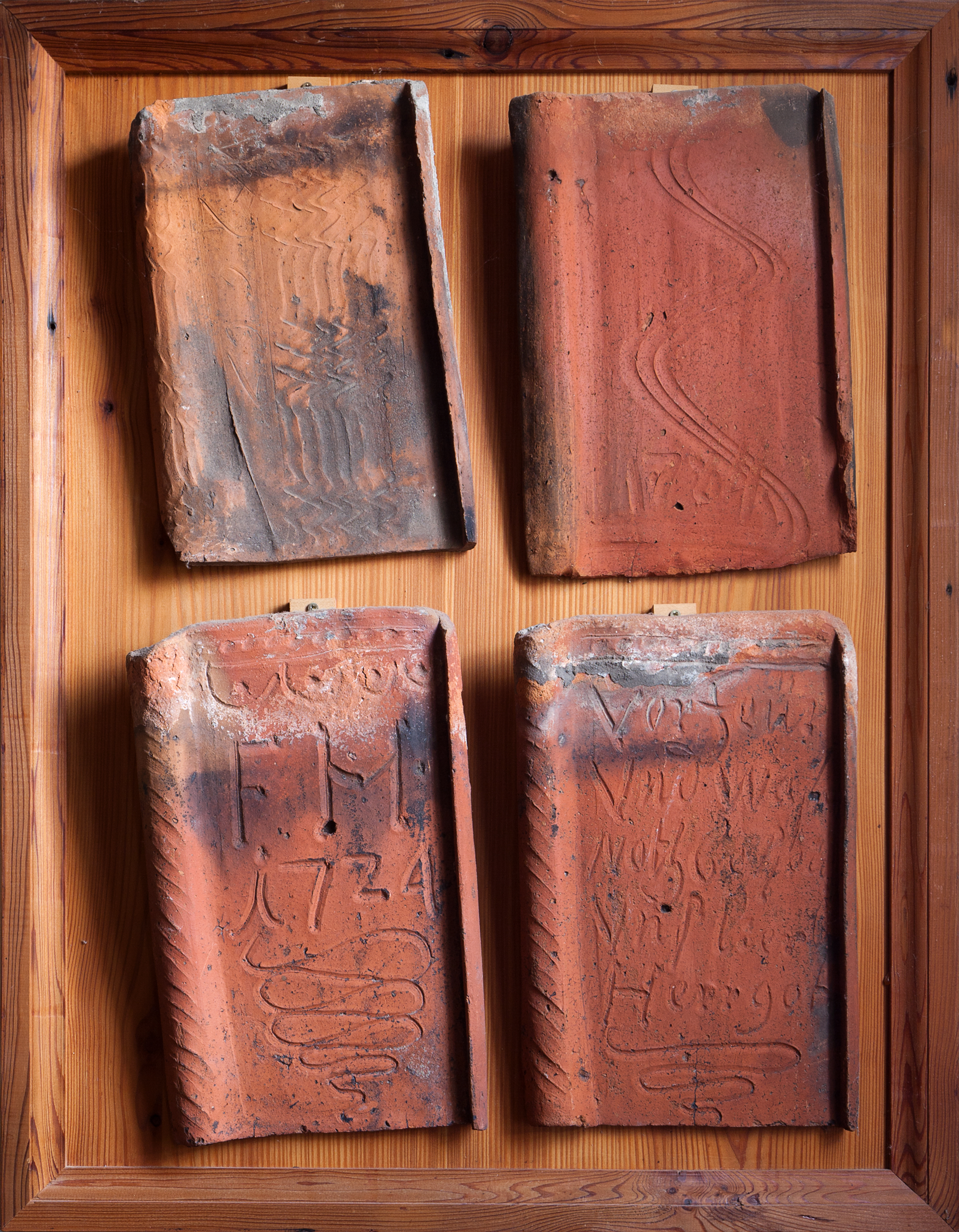 Dachziegeln des Guts Marienhof. Die linke untere Dachziegel stammt vom Lehenshaus in der Nähe von Völkershausen. Auf der rechten unteren Dachziegel ist zu lesen: Vor Feuer und Wasser beschütz uns lieber Herrgott.